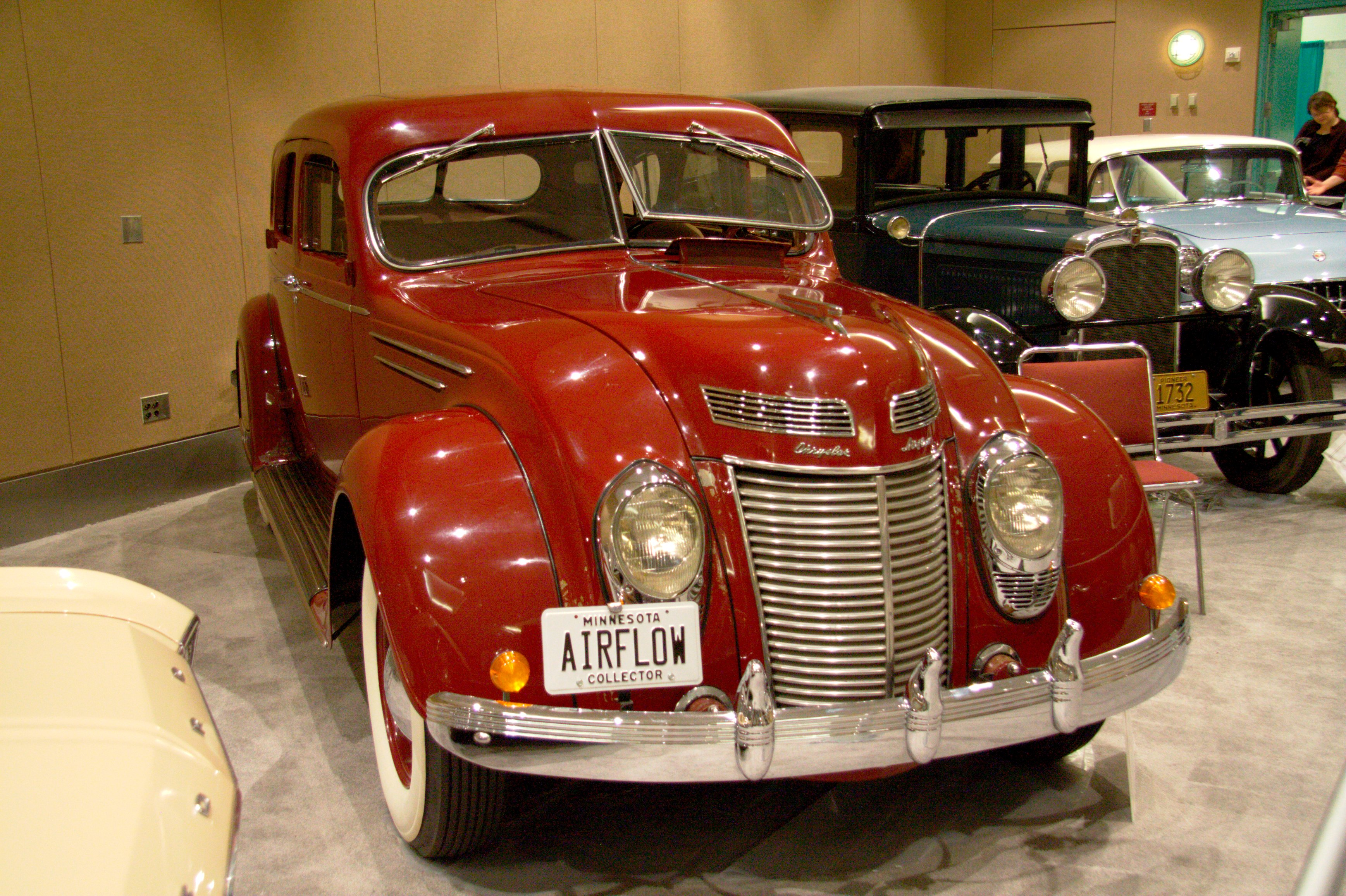 Chrysler Airflowimg_4058-raw